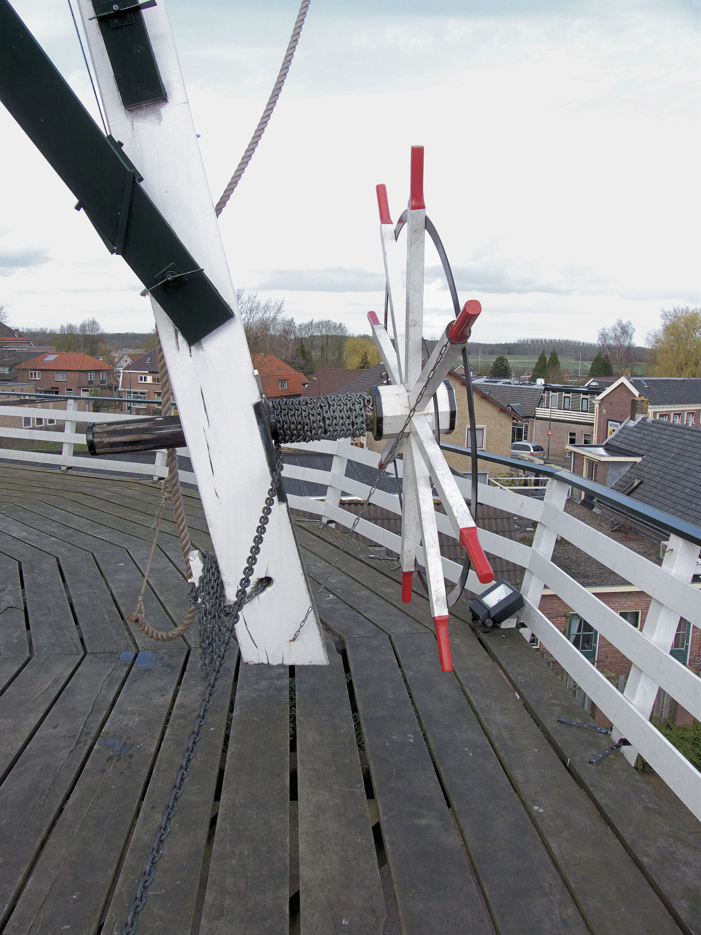 Molen Cothen\Molen Oog in 't Zeil, kruirad, Cothen, Netherlands